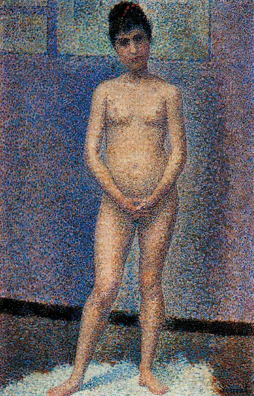 Modella in piedi, o/tv, 26x17,2 cm, M. d'Orsay, Paris